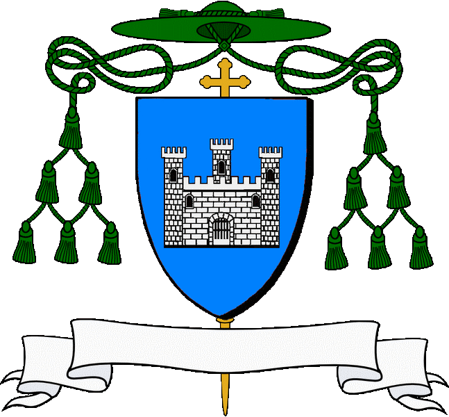 En glazur e c'hastell en arc'hant mogeriet en sabel